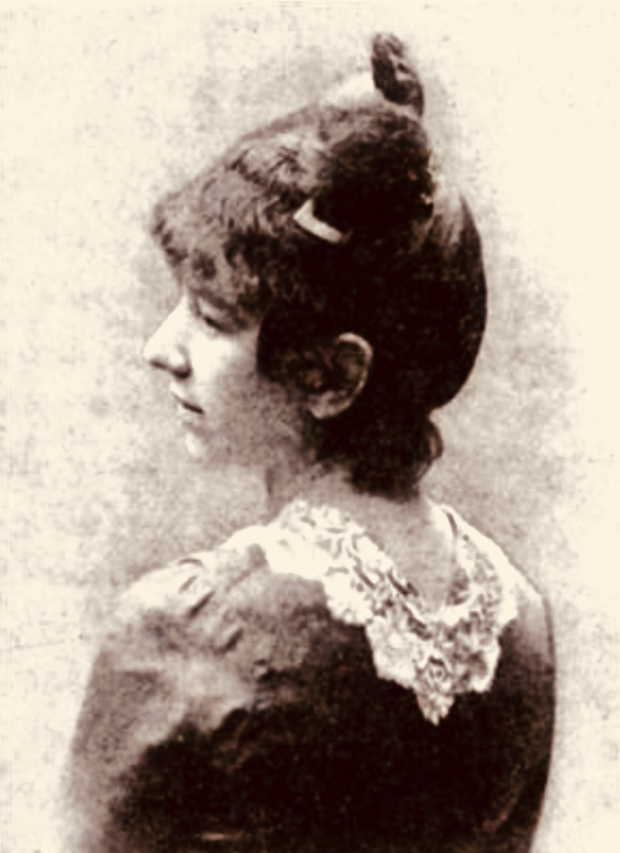 Rosa Pfäffinger (1866–1949), österreichische Malerin, Mäzenin und Bohémien, ab 1891 Ehefrau von Willy Grétor (1868–1923), auch Gretor (eigentlich: Julius Rudolph Vilhelm Petersen), befreundet mit der deutschen Bildhauerin Käthe Kollwitz (1867–1945), Mutter von Georg Gretor (1892–1943, Pseudonym: Georges Barbizon).